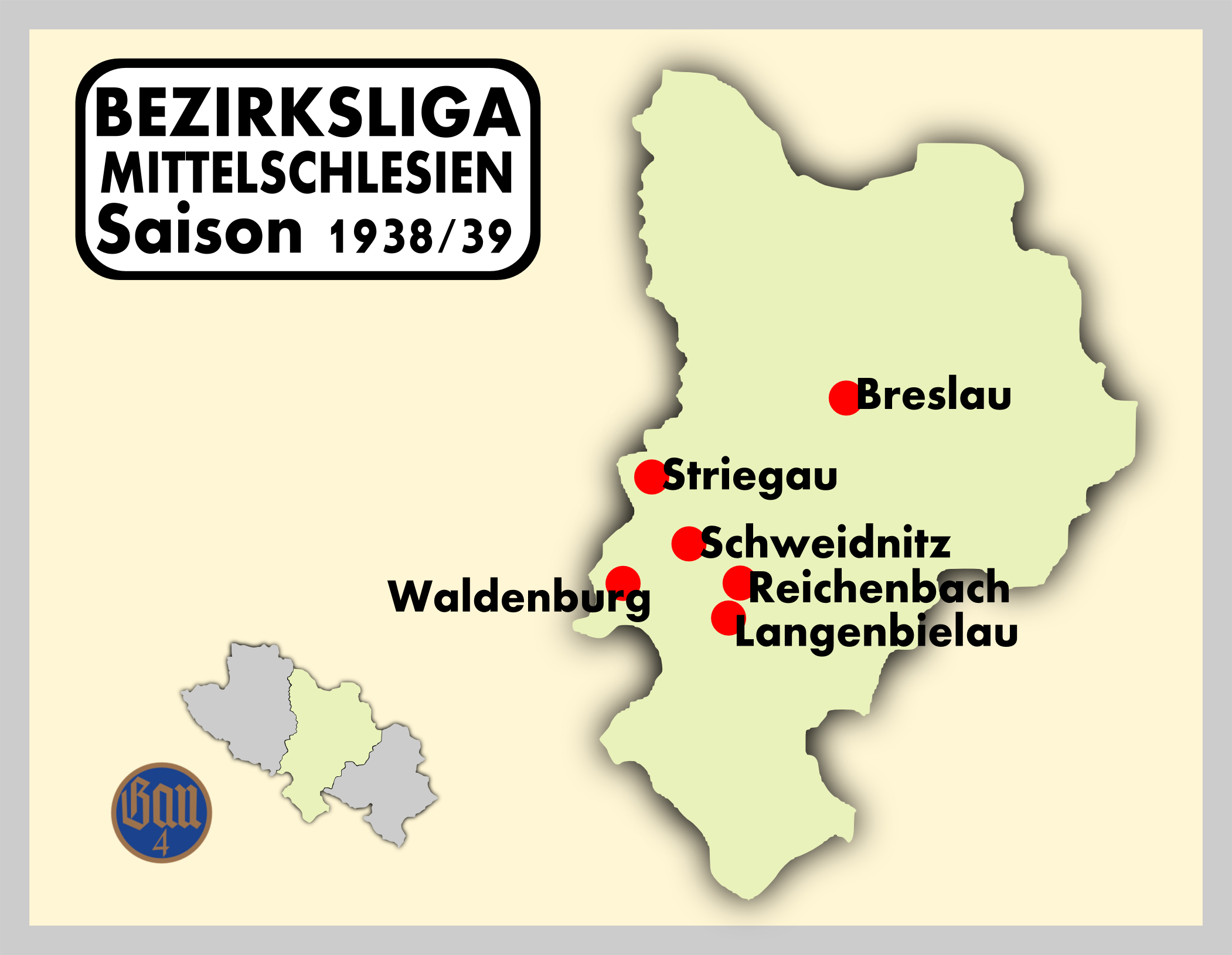 Spielorte der Bezirksliga Mittelschlesien 1938/39.